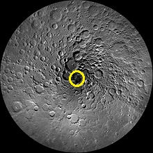 皮里环形山的位置照片